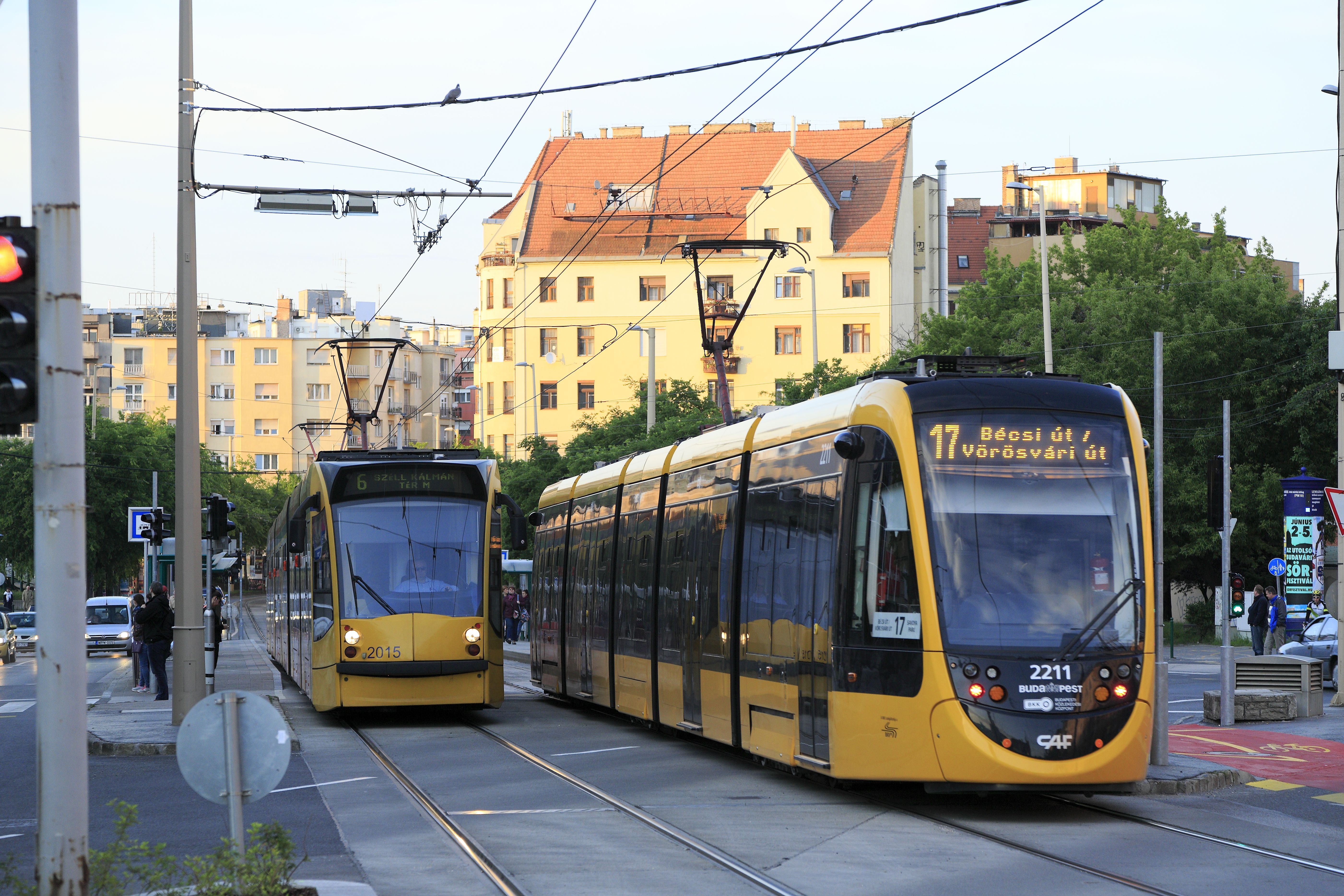 »Urbos 3« von CAF, Linie 17 Savoya Park–Bécsi út (Wiener Straße) beim Verlassen der Haltestelle Széll Kálmán tér Richtung Margit körút, Nachschuss. Der entgegenkommende ET 2015 läuft auf der Paradelinie 6.